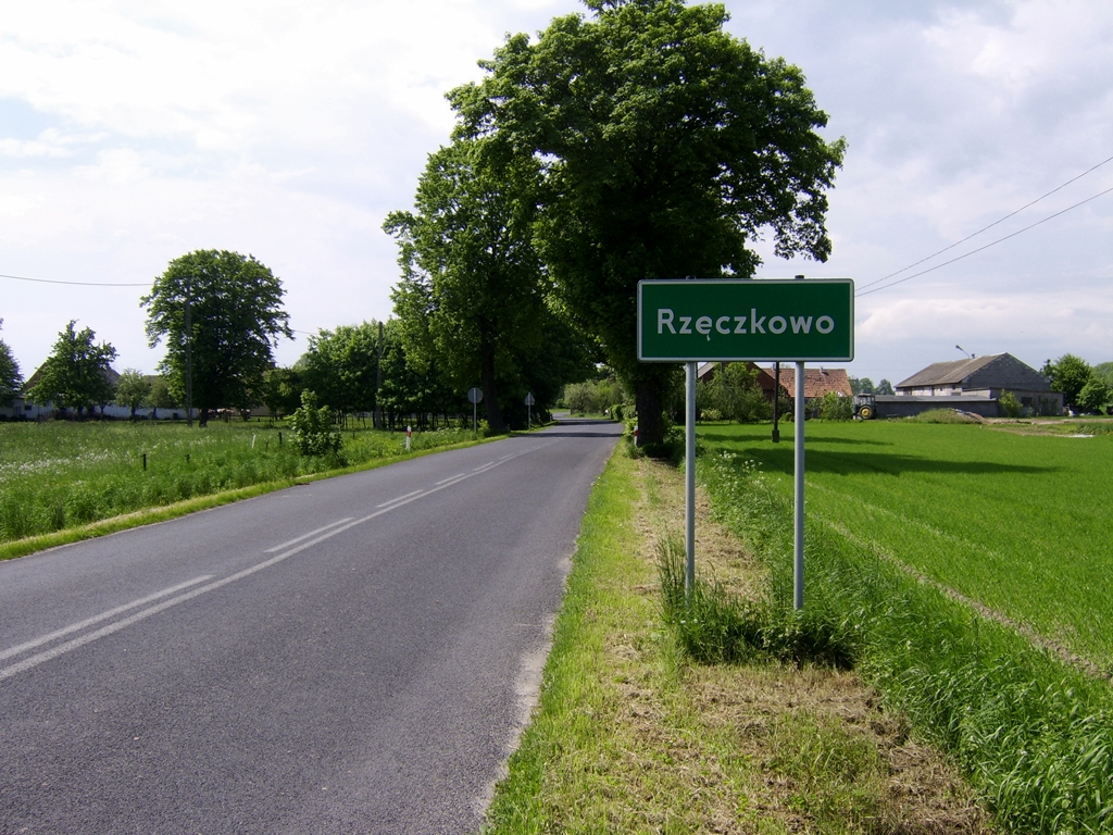 Wieś Rzęczkowo